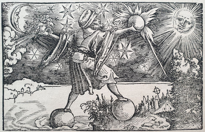 Frontespizio dell'edizione della Historia Mundi Naturalis, di Plinio il Vecchio (Plinius Secundus Gaius) pubblicata a Francoforte sul Meno per i tipi di Sigmund Feyerabend nel 1582.